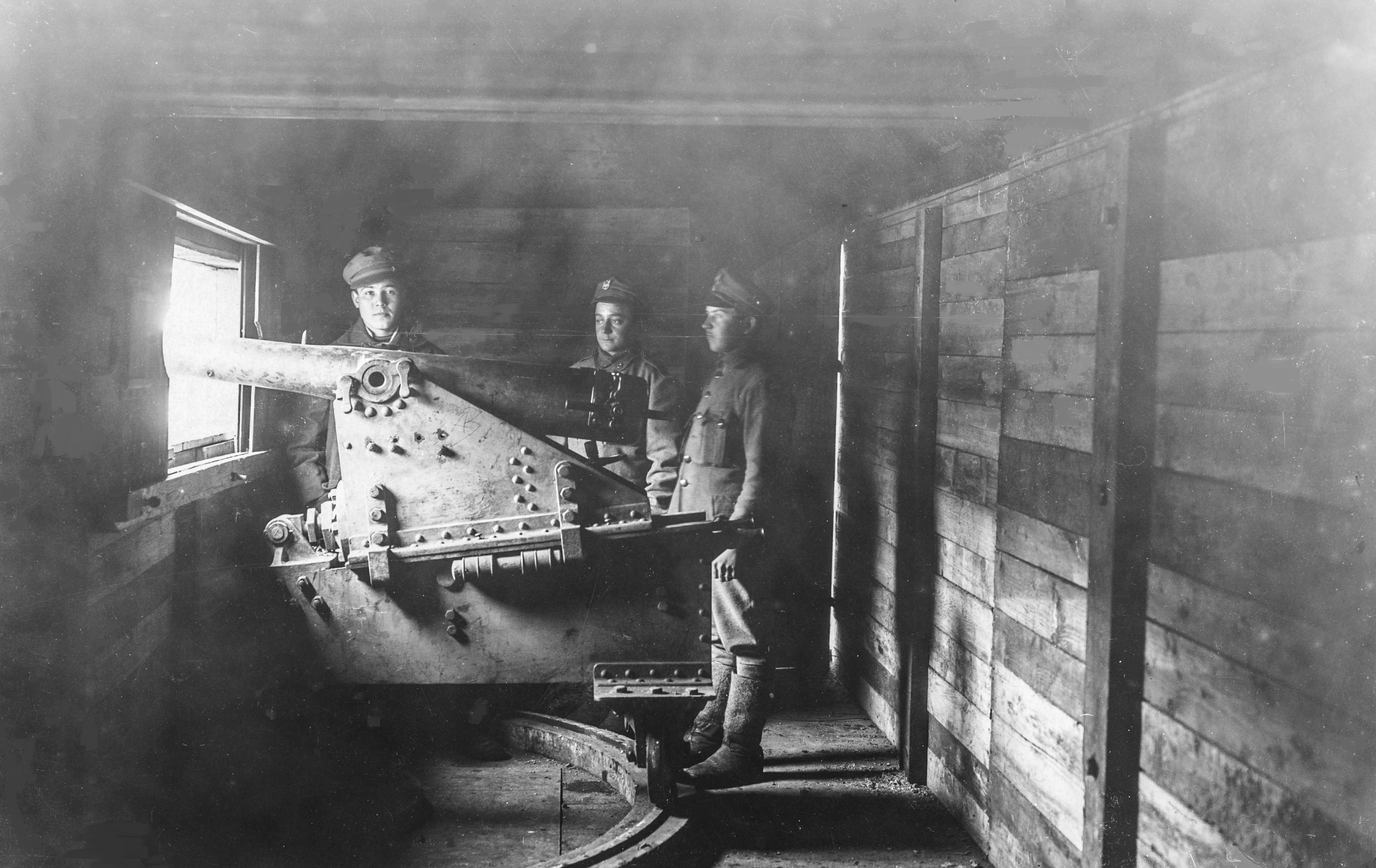 Walki polsko-ukraińskie - wnętrze wagonu pociągu pancernego "Śmiały". Żołnierze przy armacie na stanowisku bojowym. Koncern Ilustrowany Kurier Codzienny - Archiwum Ilustracji. Sygnatura: 1-H-366